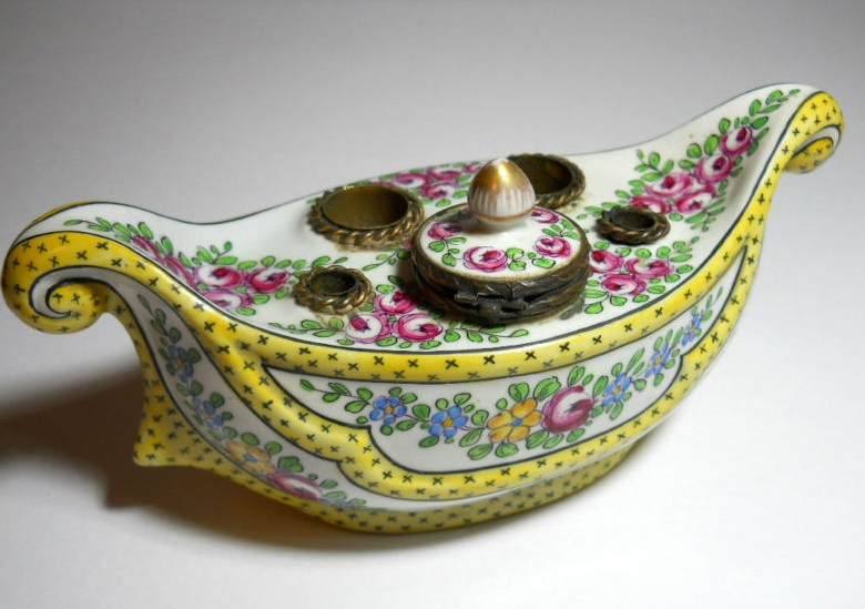 Encrier en faïence décorée, Manufacture Fourmaintraux, Desvres, France